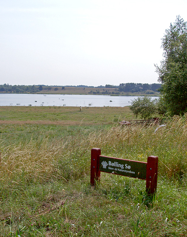 Bølling Sø er en genskabt sø mellem Engesvang, Funder og Kragelund sogne i Midtjylland.